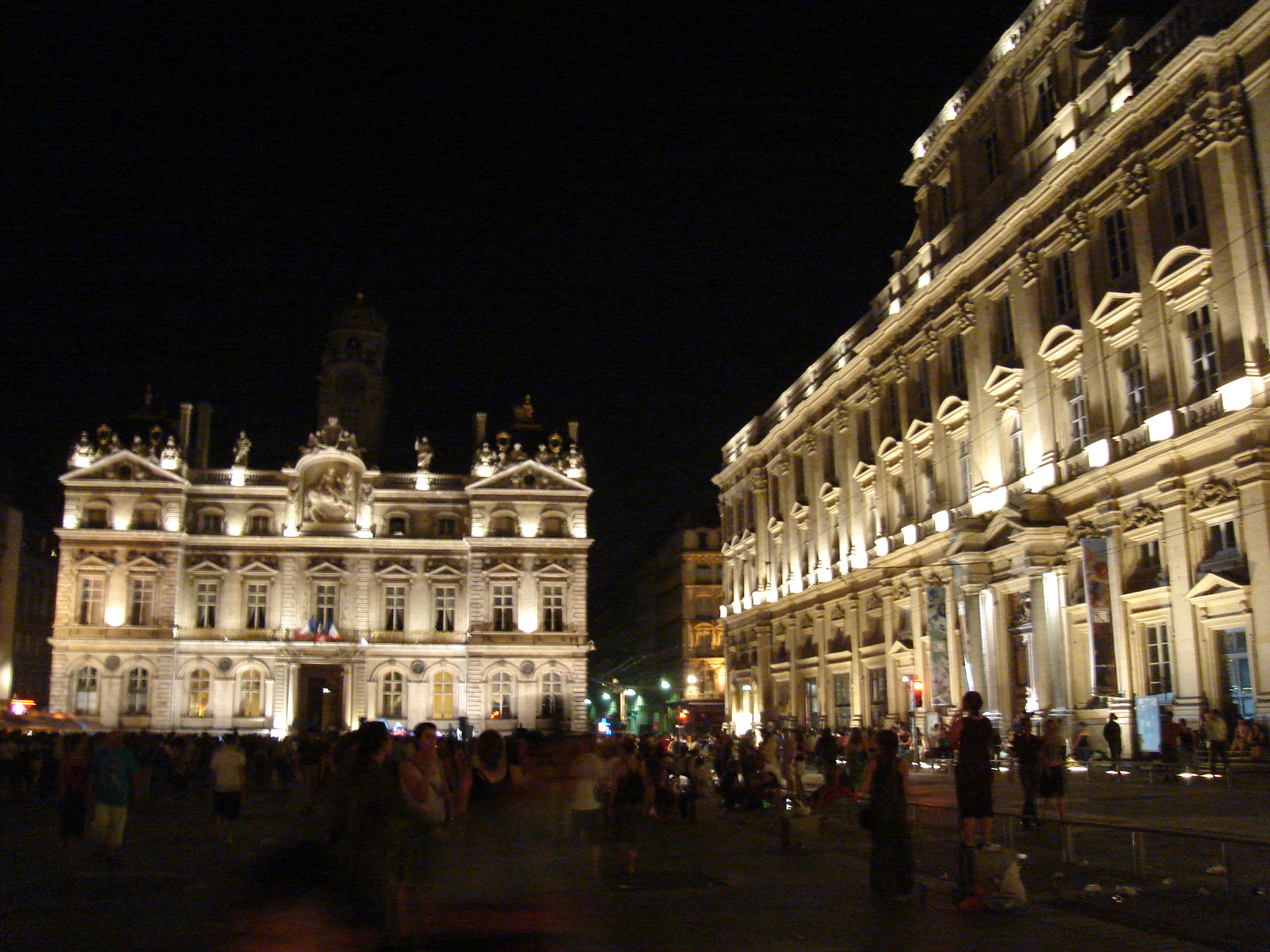 La Place des Terreaux, illuminée la nuit